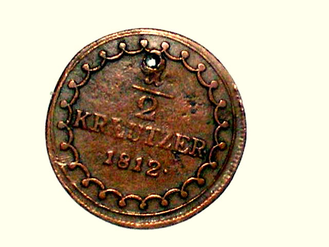 This coin was minted in Smolník, Slovakia 1812. Mincovňa "S" - Smolník. Zadná strana (reverz) mince, z obdobia Rakúskeho cisárstva (rok 1812). Priemer 21 mm, hmotnosť 2,19 g, materiál meď. Nájdená v Sedliciach asi v roku 1984. Zo súkromnej zbierky.